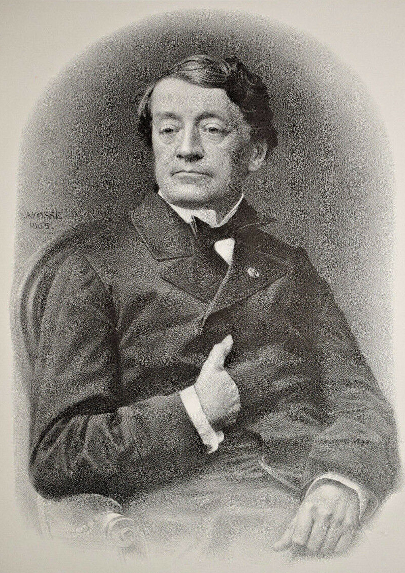 Comte Léon de Laborde